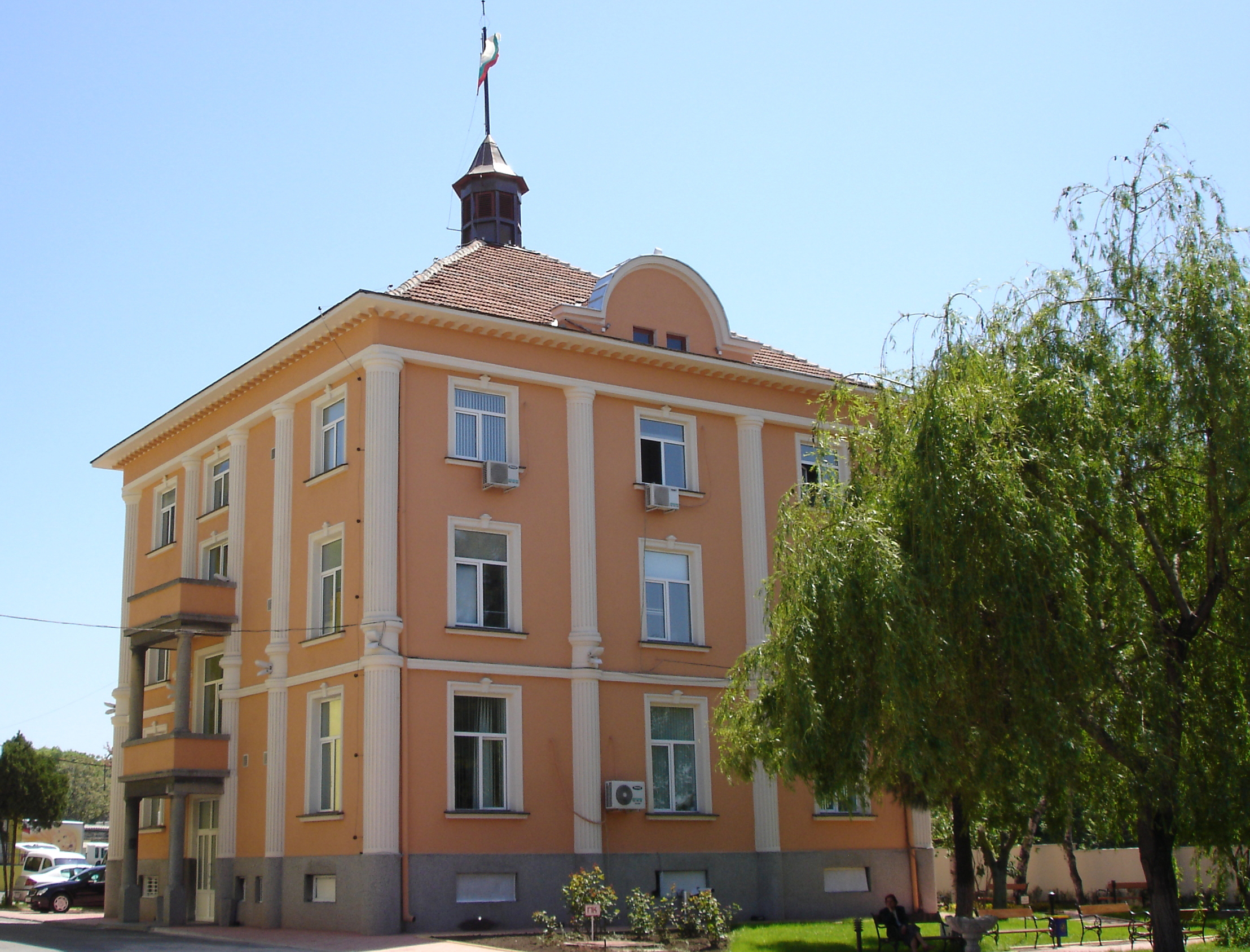 Централен офис на "Победа" АД, гр. Бургас